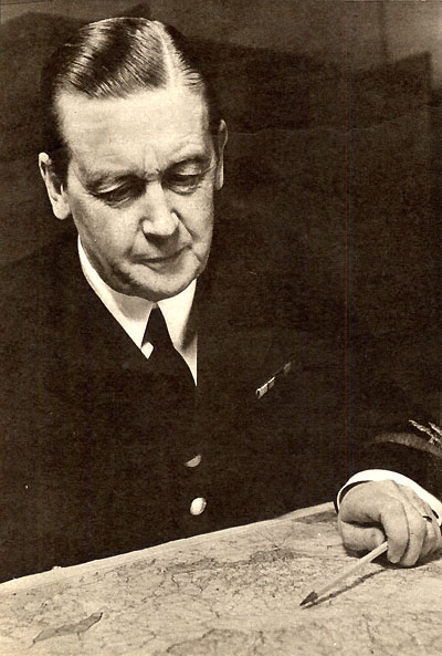 Torsten Friis